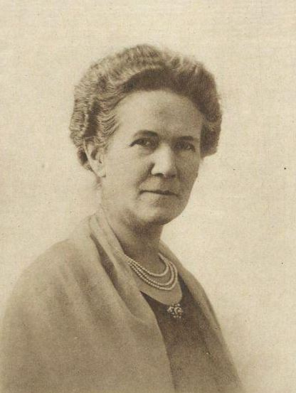 Elisabeth Henriëtta Maria de Jonge